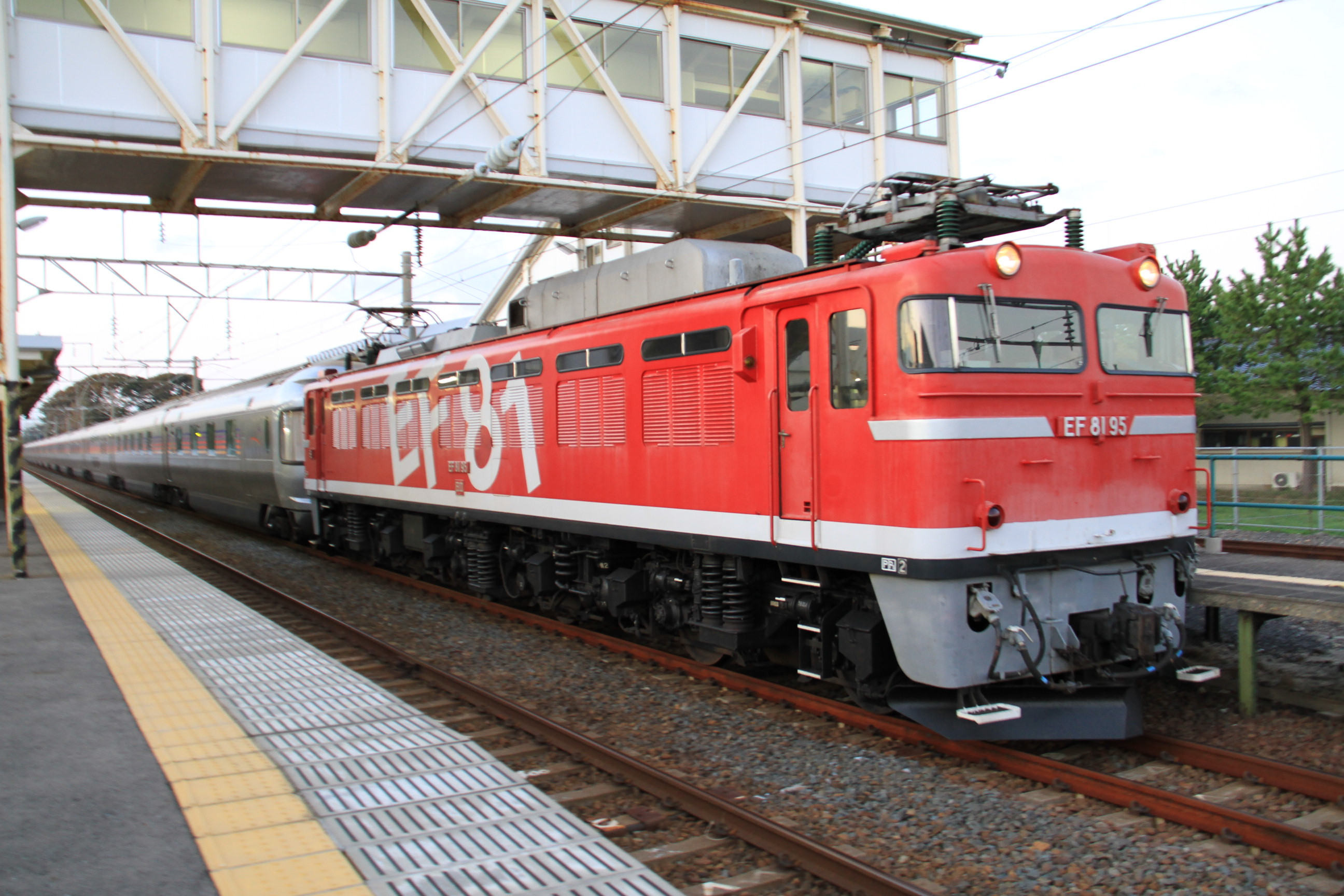 象潟駅運転停車